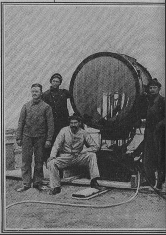 installation de projecteurs pour se prémunir contre les raids de Taubes et de Zepelins.